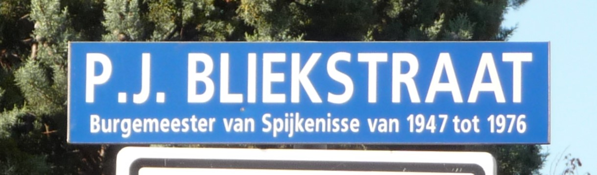 P.J. Bliekstraat Spijkenisse 10-11-2019 - straatnaambord